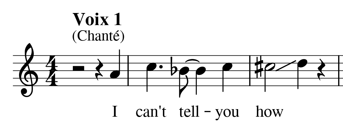 Extrait de la pièce XIV d'Anna Livia Plurabelle d'André Hodeir